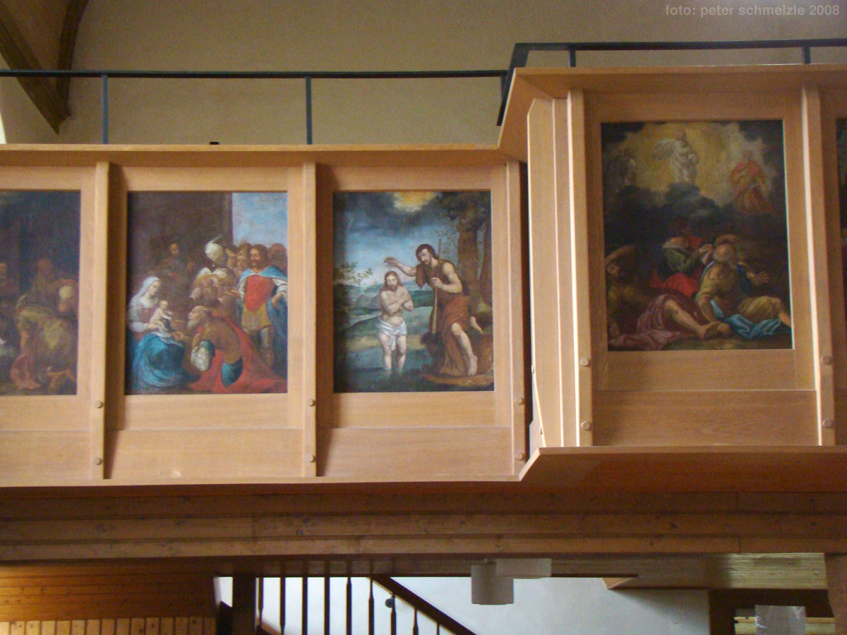 Emporenbrüstung der evang. Kirche in Stetten am Heuchelberg (Stadt Schwaigern)